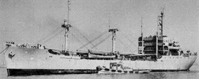 Buque carguero peruano MV BAP Napo